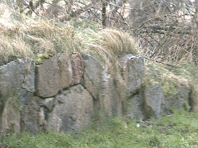 Mur- po młynówce